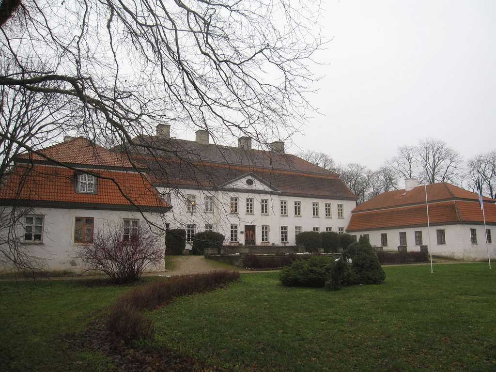 Hiiu-Suuremõisa mõisa härrastemaja